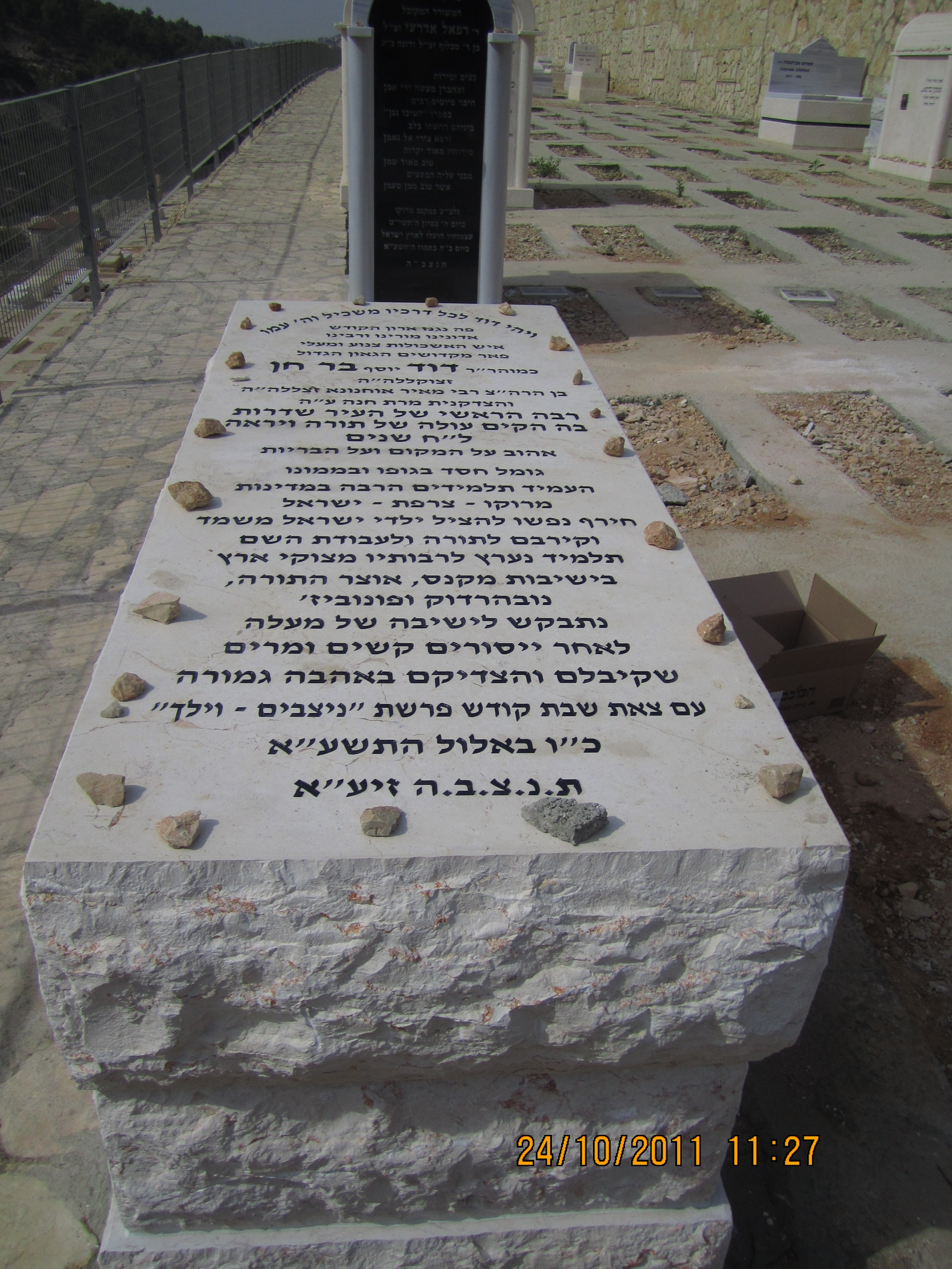 ציון קבורתו, חלקת הרבנים החדשה, הר המנוחות - ירושלים